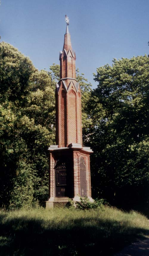 Denkmal für die Befreiungskriege nahe dem Haussee in Wolfshagen, Brandenburg, Deutschland